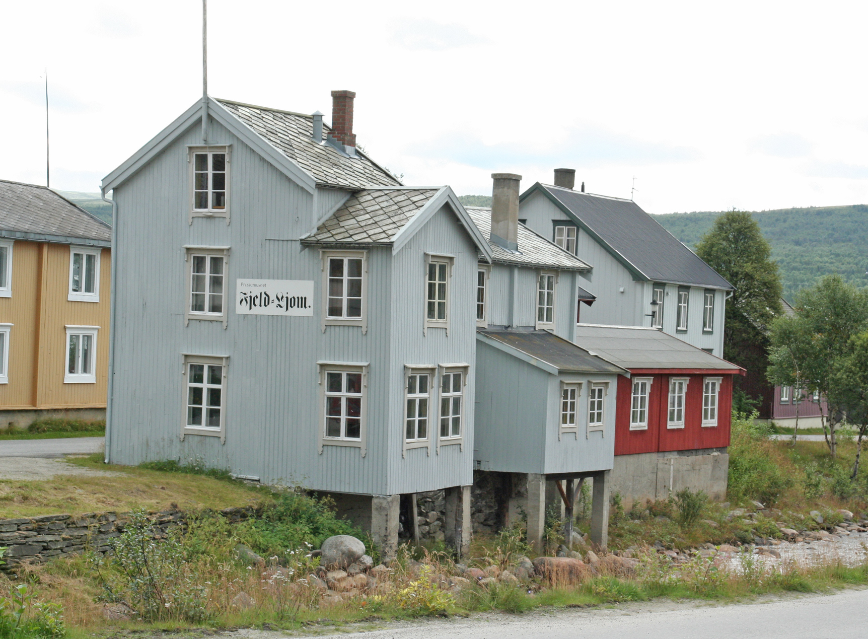 Pressemuseet Fjeld-Ljom er et museum på Røros i Sør-Trøndelag, bygd opp i de gamle redaksjonslokalene og trykkeriet til avisa Fjell-Ljom ved Hitterelva, der avisa ble produsert i 88 år fra 1891.